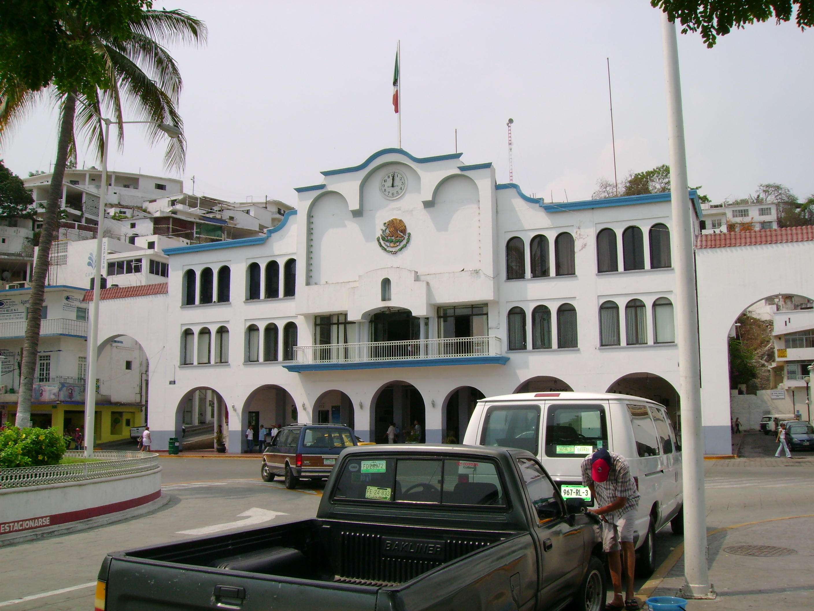 Palacio de Gobierno